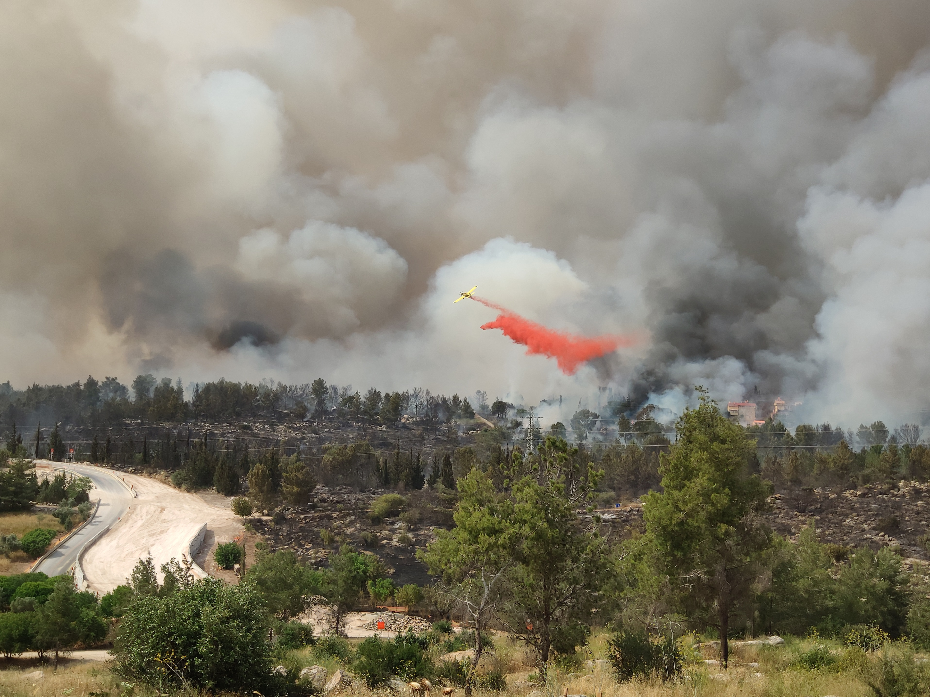 מטוס כיבוי בפעולה בשריפה באזור מבוא מודיעים, 23 במאי 2019. צולם מאזור התעשייה של מודיעין